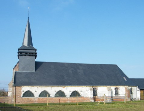 Vergies, Somme, France, l'église Notre-Dame de l'Assomption.